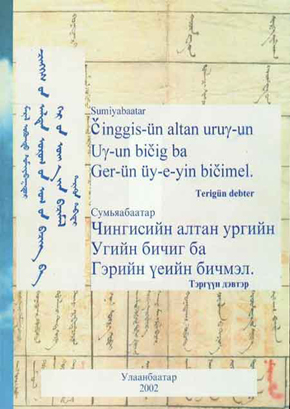 Монгол: Б. Сумъяабаатар, "Чингисийн алтан ургийн үгийн бичиг ба гэрийн үеийн бичмэл", xуудас 720, ISBN 99929-5-552-X